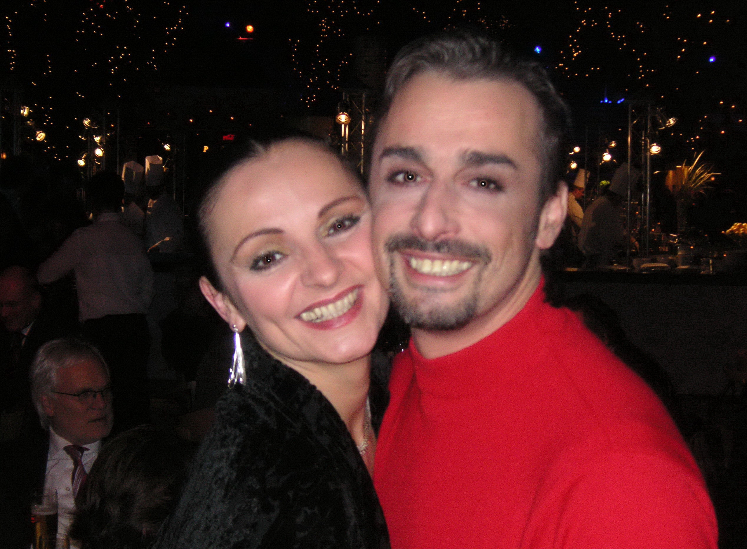 Ophelia Vilarova und Fernsehballett-Kollege André Höhl beim Empfang zum 70. Geburtstag von Dieter Thomas Heck - Estrel Hotel Berlin.